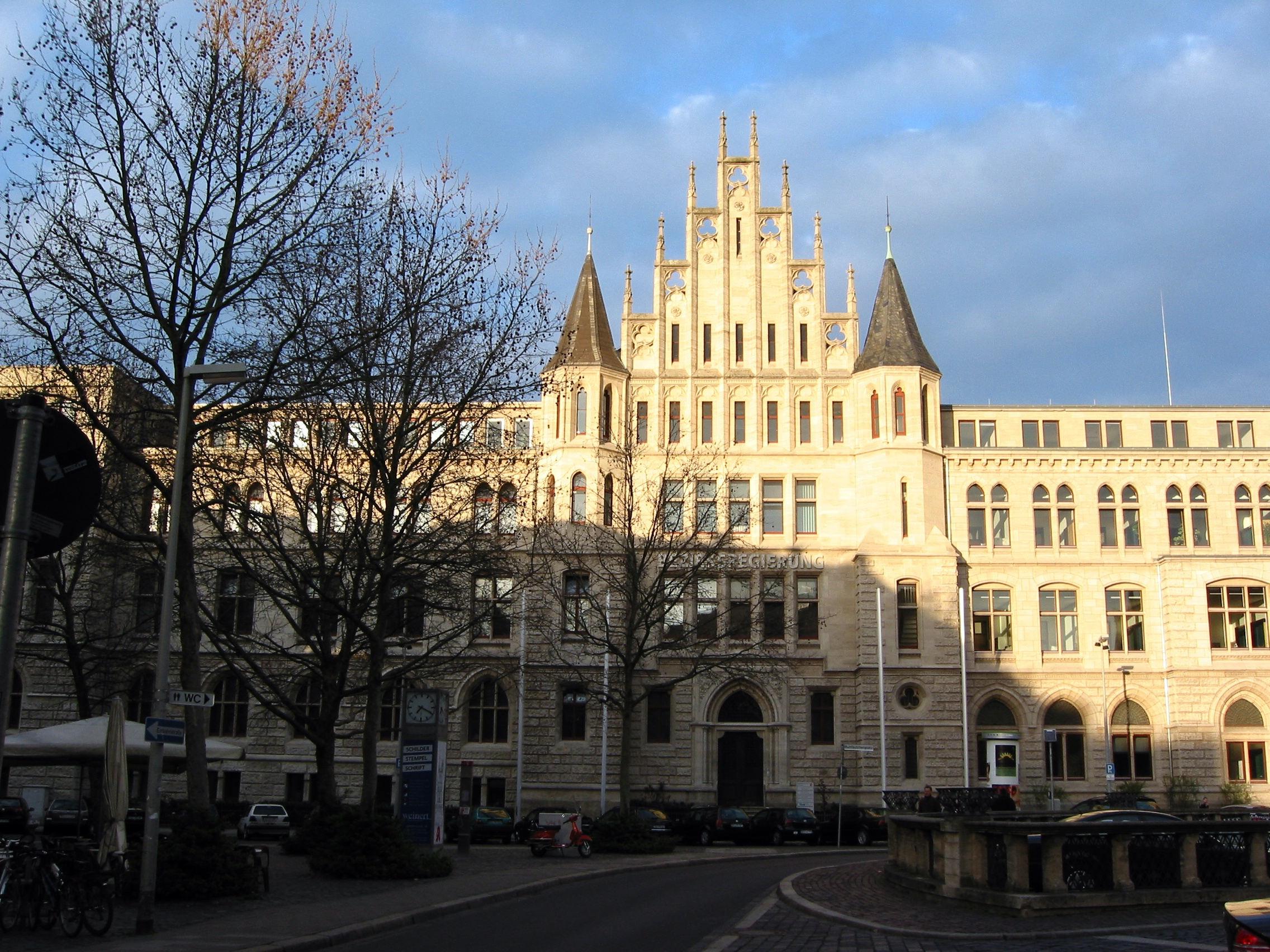 Braunschweig, Bezirksregierung